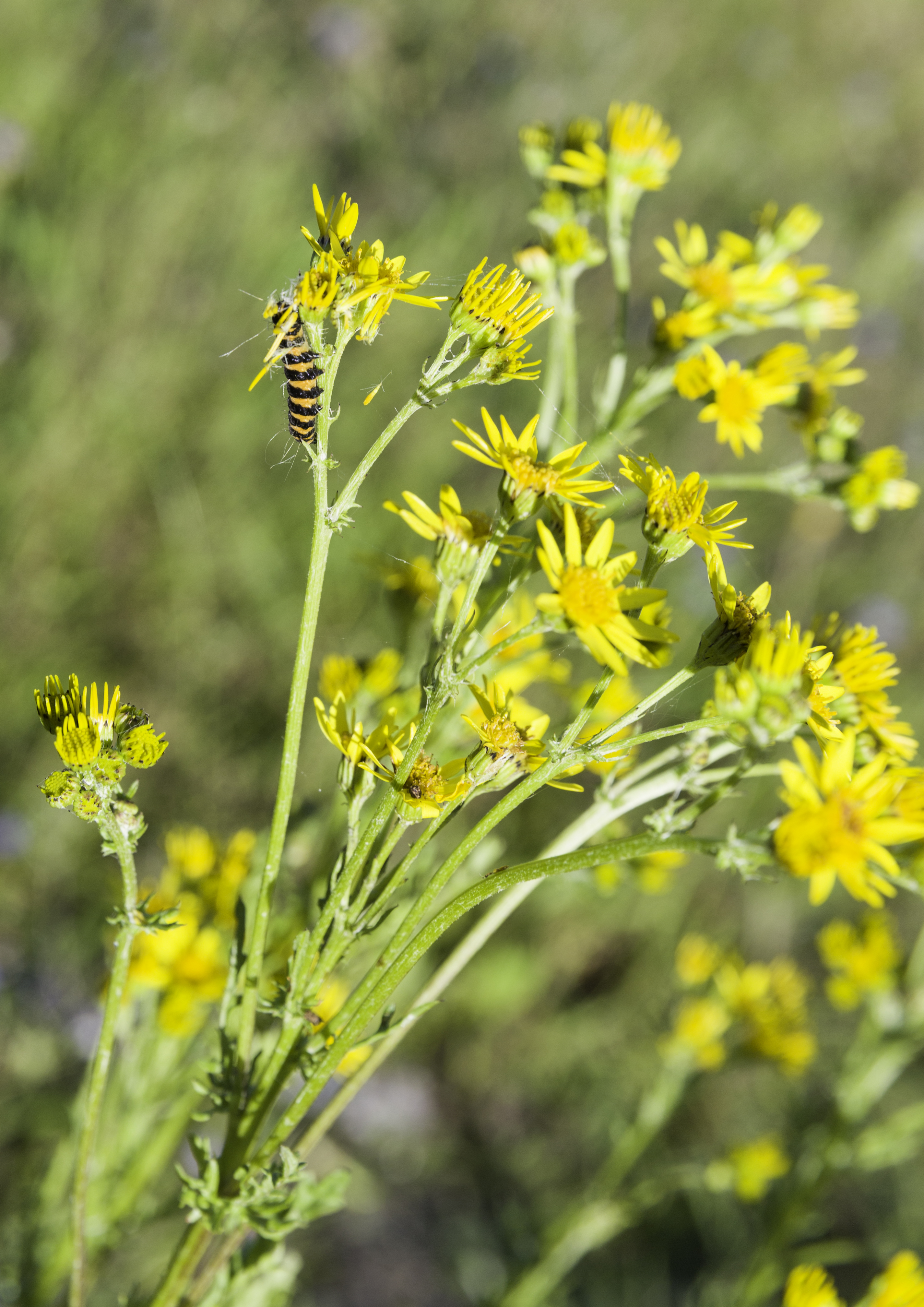 Larve af blodplet på engbrandbæger